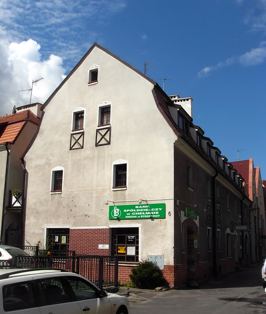 Dawny spichrz przy ul. Pod Blankami 6 w Bydgoszczy